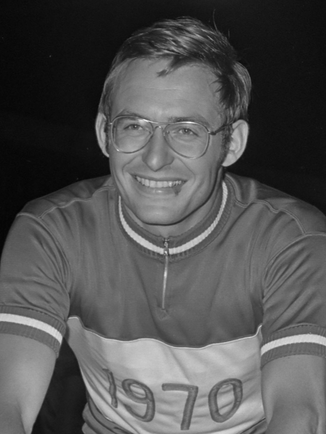 Nationale wielerkampioenschappen op de baan in Olympisch Stadion ; Jan Jansen , kampioen sprint profs tijdens ereronde 27 juli 1970